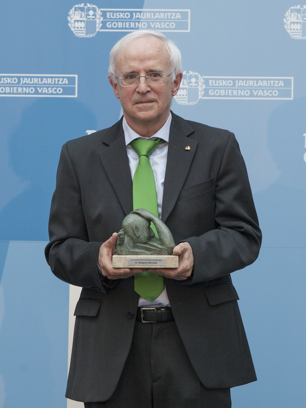 El lehendakari Iñigo Urkullu y la Consejera de Educación, Política Lingüística y Cultura, Cristina Uriarte, han entregado esta tarde en Lehendakaritza el Premio Euskadi de Investigación 2013 en la modalidad de Ciencias Sociales y Humanidades al historiador y jurista Gregorio Monreal. “Este premio reconoce el compromiso con la historia y con el futuro de nuestro pueblo”, ha destacado Urkullu, “porque Gregorio Monreal ha participado activamente en la cimentación de las instituciones políticas que hoy vertebran nuestro autogobierno”. El lehendakari también ha querido destacar que el premiado ha puesto de relieve la importancia de las instituciones públicas vascas. La mayor parte de su obra científica se ha concentrado en “dos grandes monumentos forales: el derecho histórico vizcaíno y el navarro”. Monreal, formado en la Universidad de Deusto, es catedrático emérito de Historia del Derecho y de las Instituciones de la Universidad Pública de Navarra, y fue rector de la Universidad del País Vasco, y fundador y director científico del Instituto Universitario de Derecho Histórico de Vasconia.